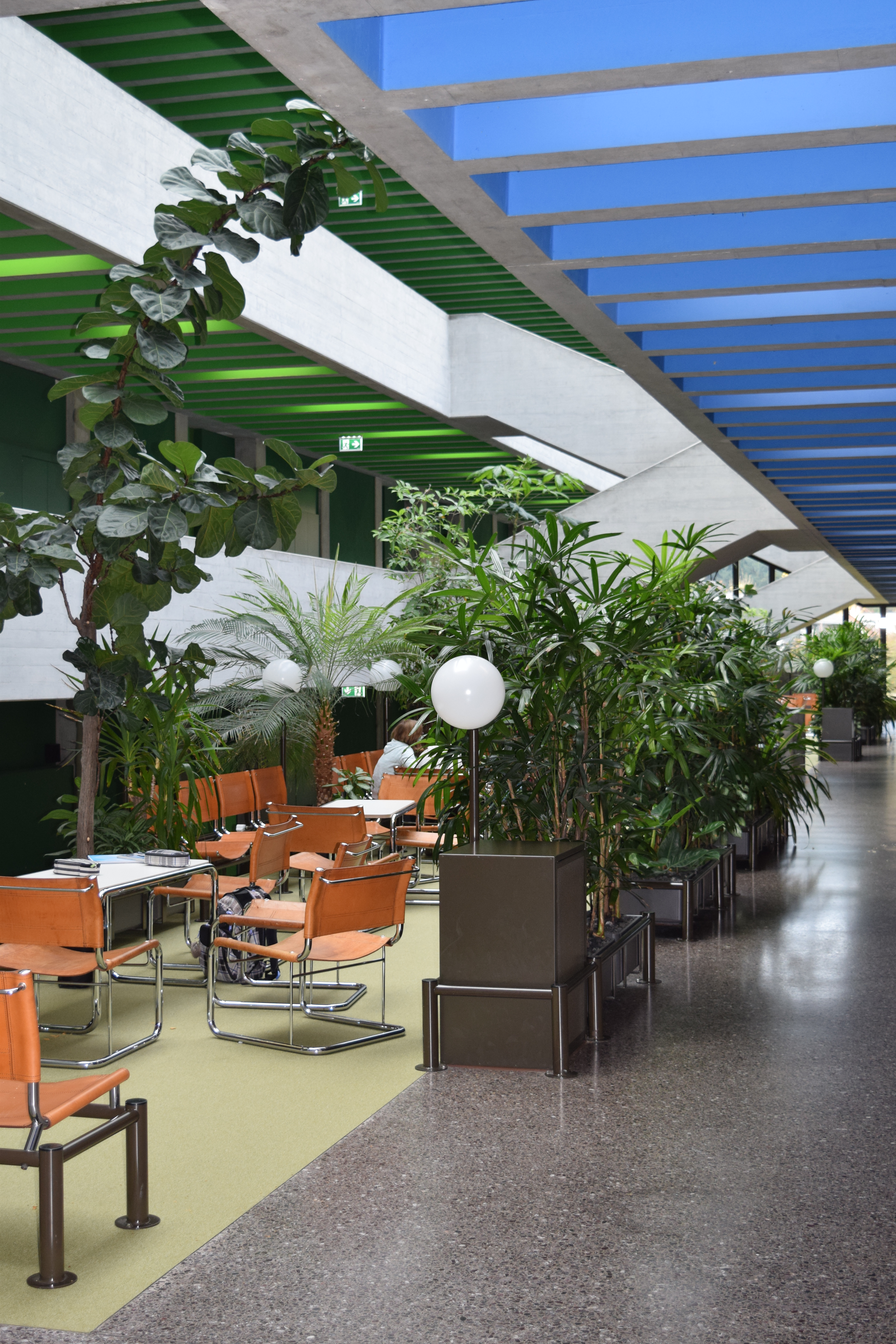 Aufenthaltsort für die Schüler